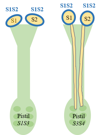 En auto-incompatibilité sporophytique, lorsque le même allèle S est partagé entre le pollen et le pistil, le pollen ne germe pas (pollen S1S2 avec pistil S1S3). Il y a compatibilité lorsque les allèles S du pollen et du pistil sont différents (pollen S1S2 avec pistil S3S4).